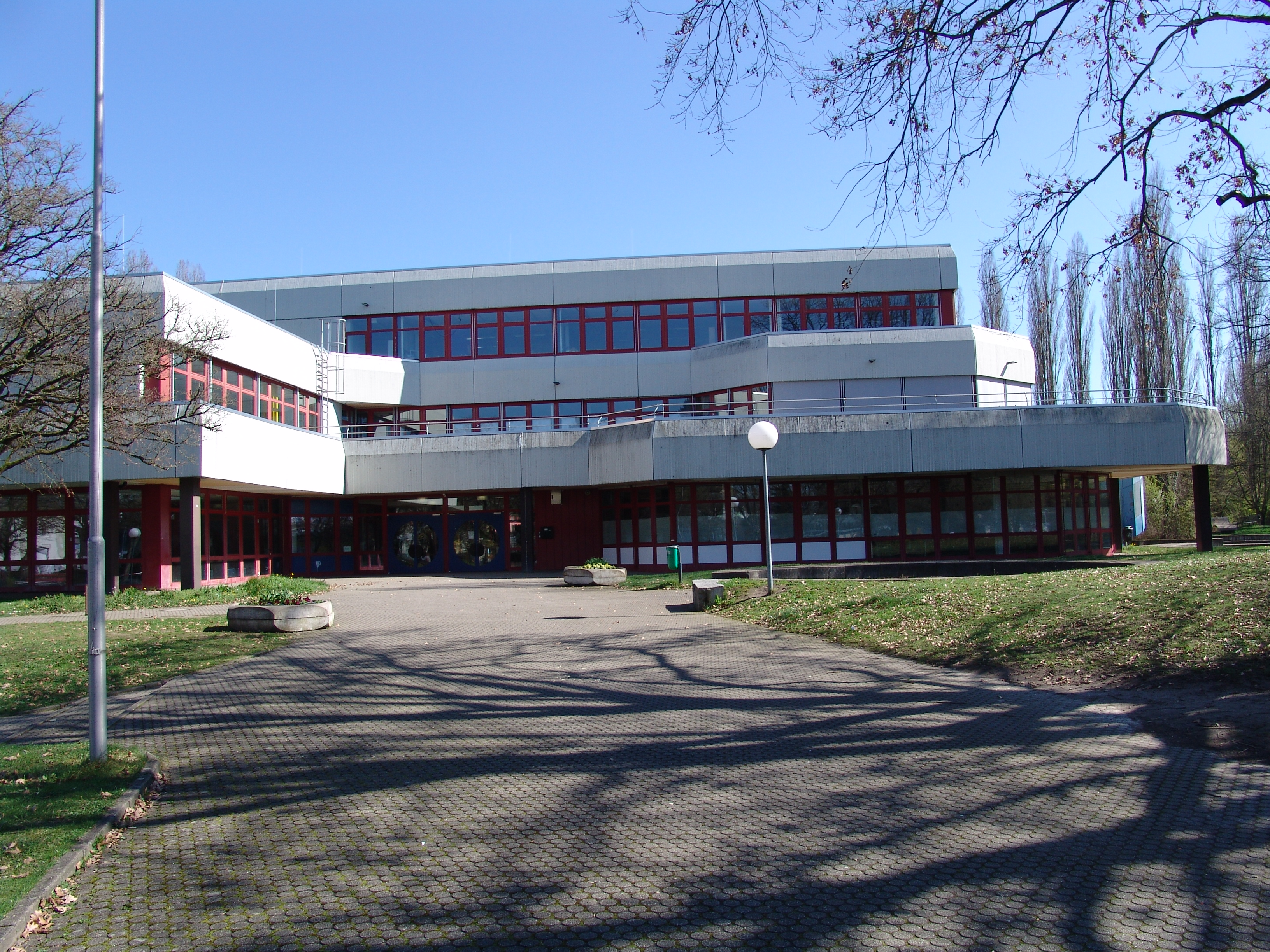 Das Bild zeigt den Haupteingang des Scheffelgymnasium Lahr